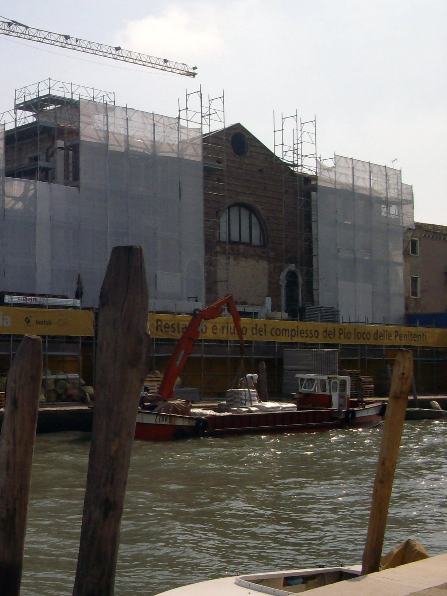 Fachada de Santa Maria delle Penitenti sobre el canal de Cannaregio. Proceso de restauración durante 2011